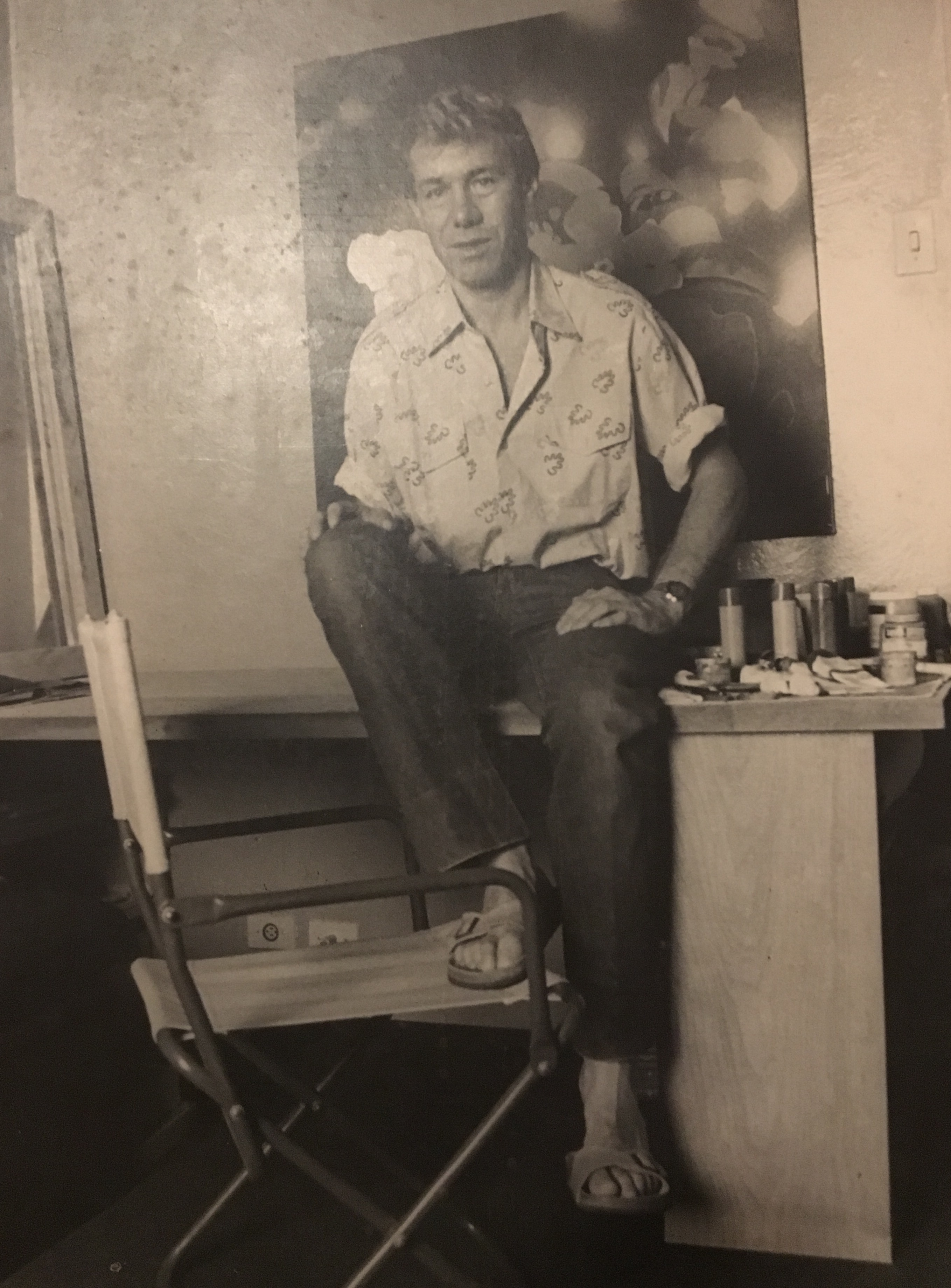 Porträt